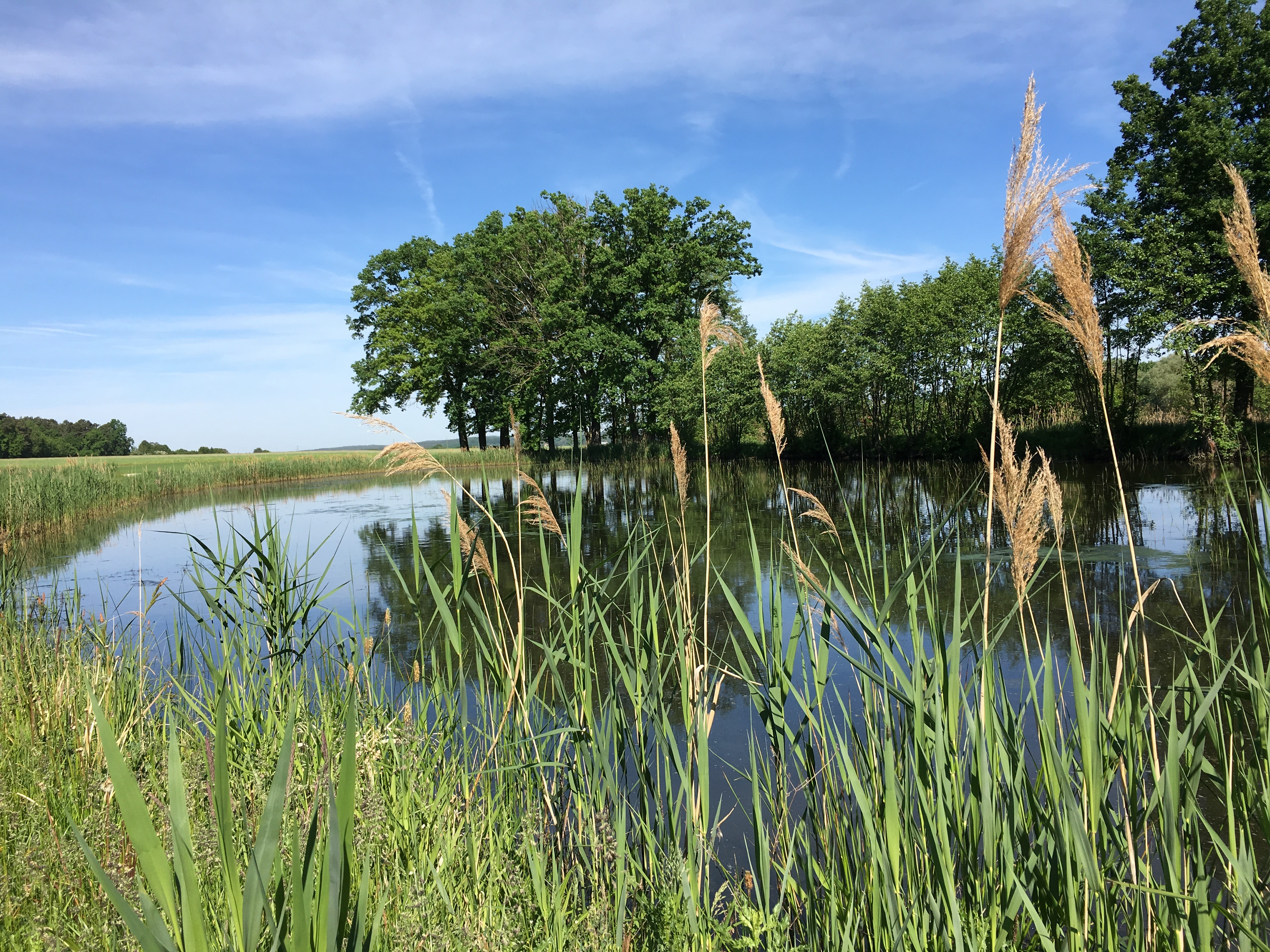 (NSG:BY-NSG-00512.01)_Langenbachgrund und Haarweiherkette